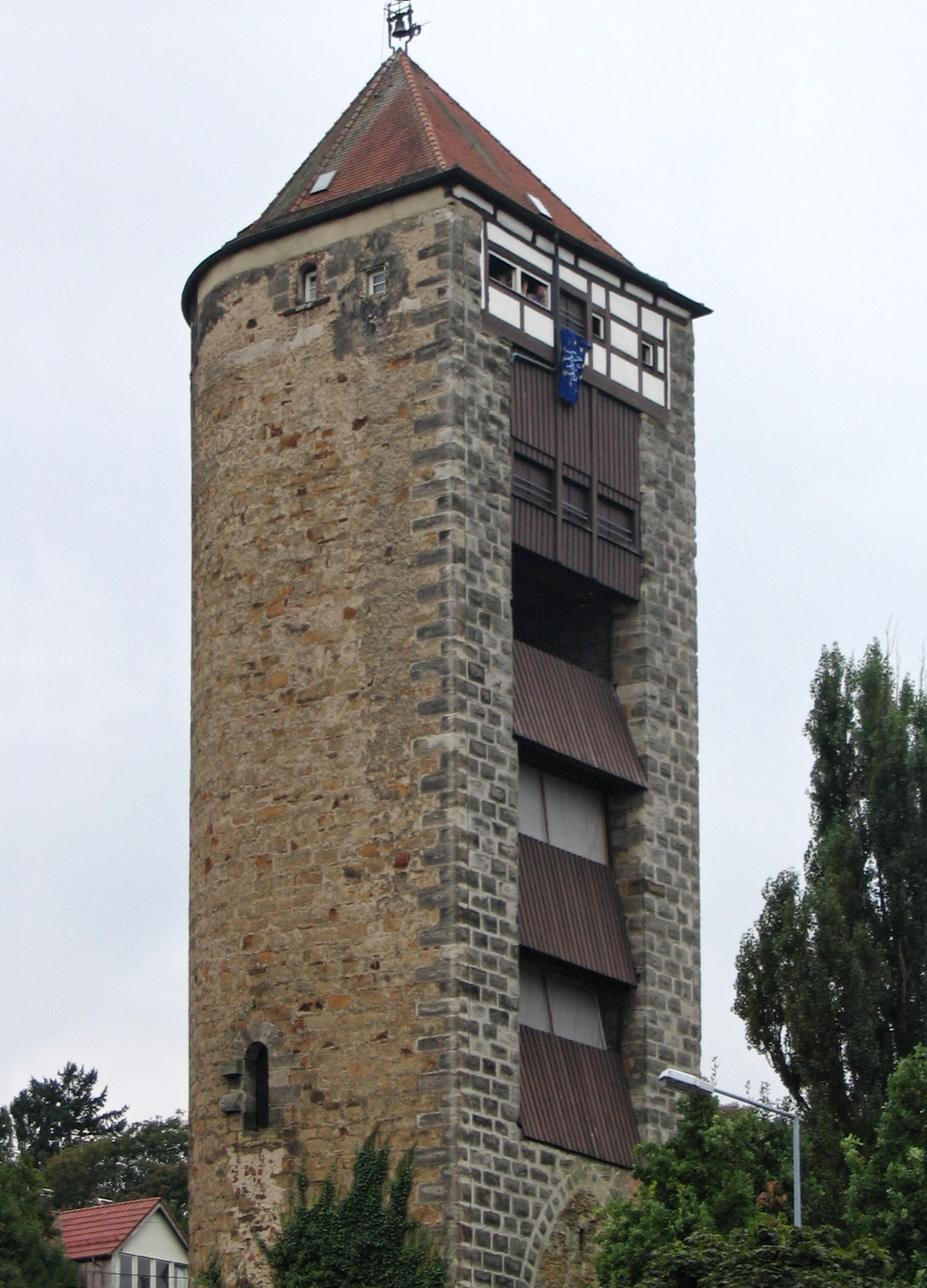 Königsturm in Schwäbisch Gmünd